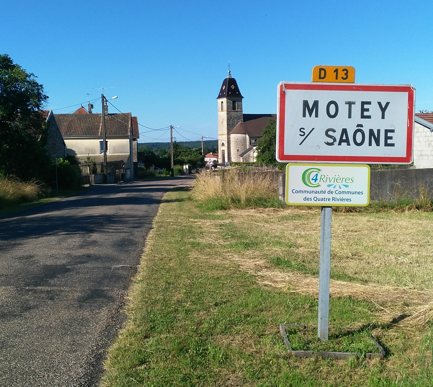 L'entrée du village